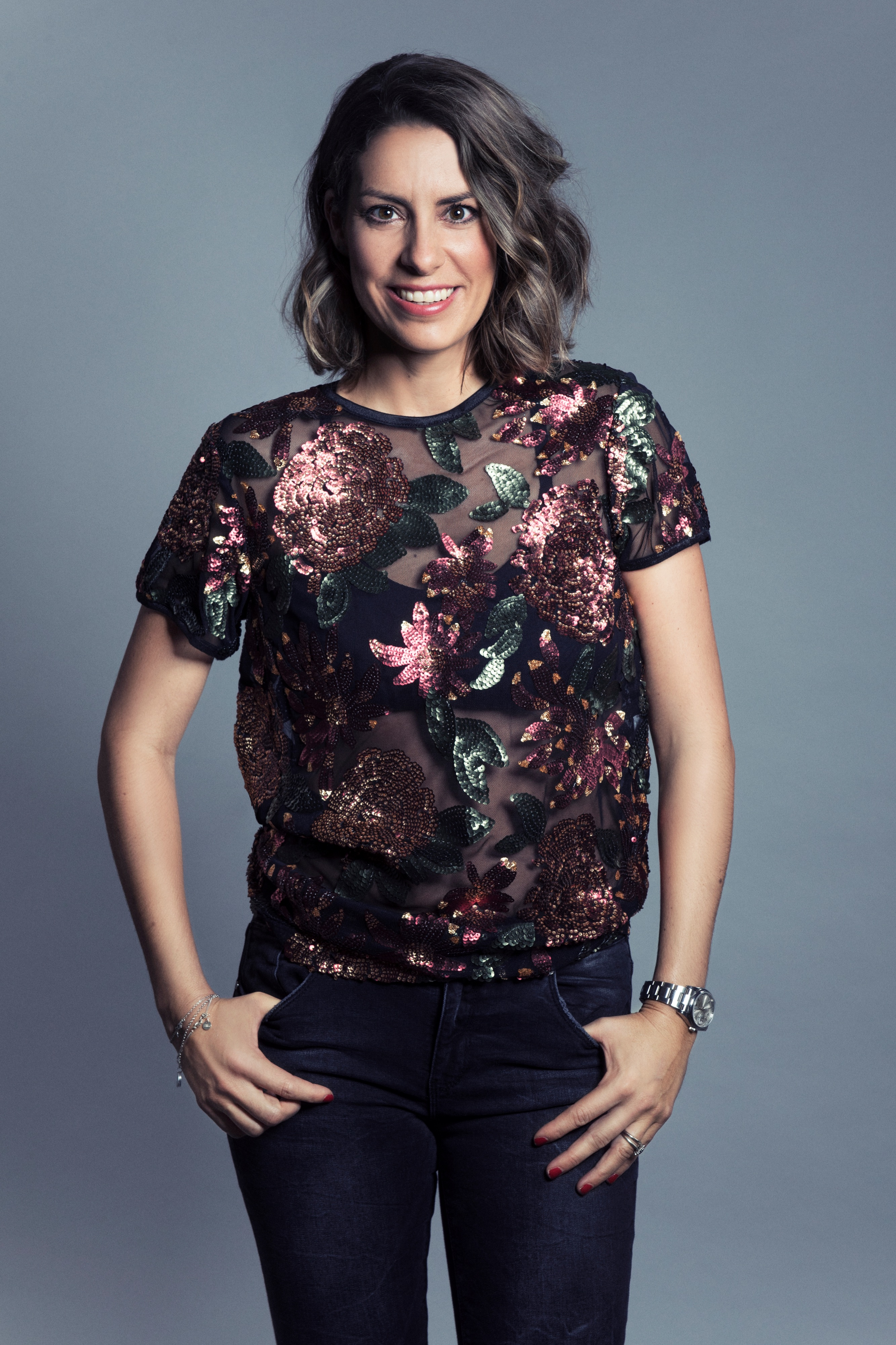 Nina Campioni Foto: Johan Lygrell